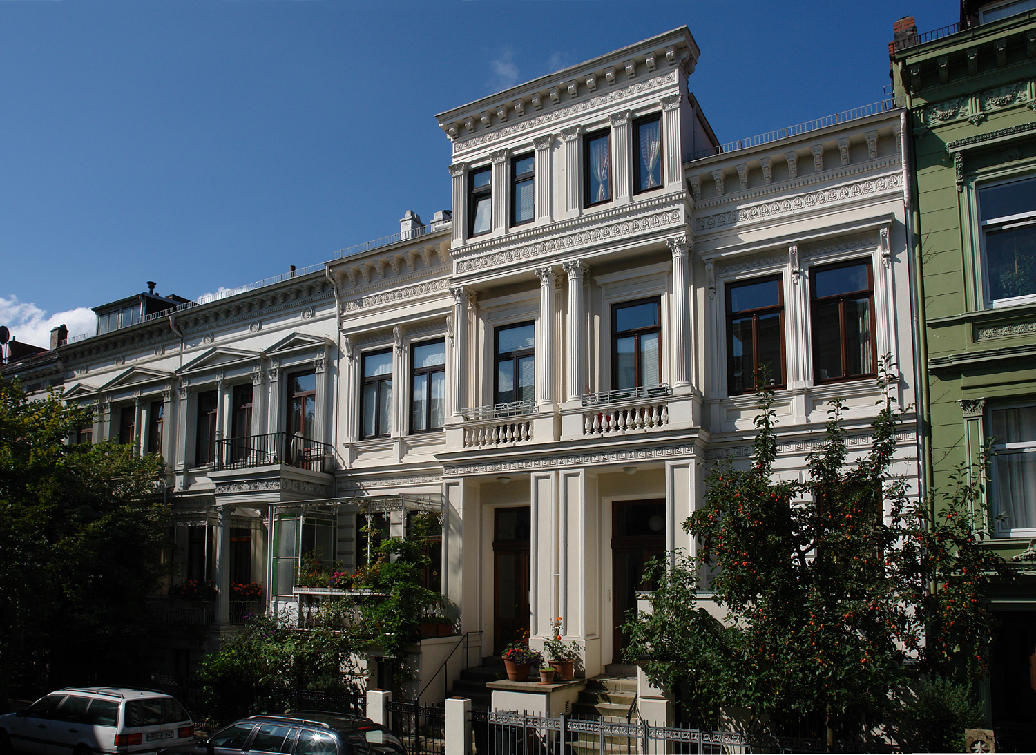 Bremer Haus in der Besselstraße 70+72 Das abgebildete Objekt ist ein geschütztes Kulturdenkmal in der Freien Hansestadt Bremen, mit der Nr. 0151 beim Landesamt für Denkmalpflege registriert. Das abgebildete Objekt ist ein geschütztes Kulturdenkmal in der Freien Hansestadt Bremen, mit der Nr. 0153 beim Landesamt für Denkmalpflege registriert.